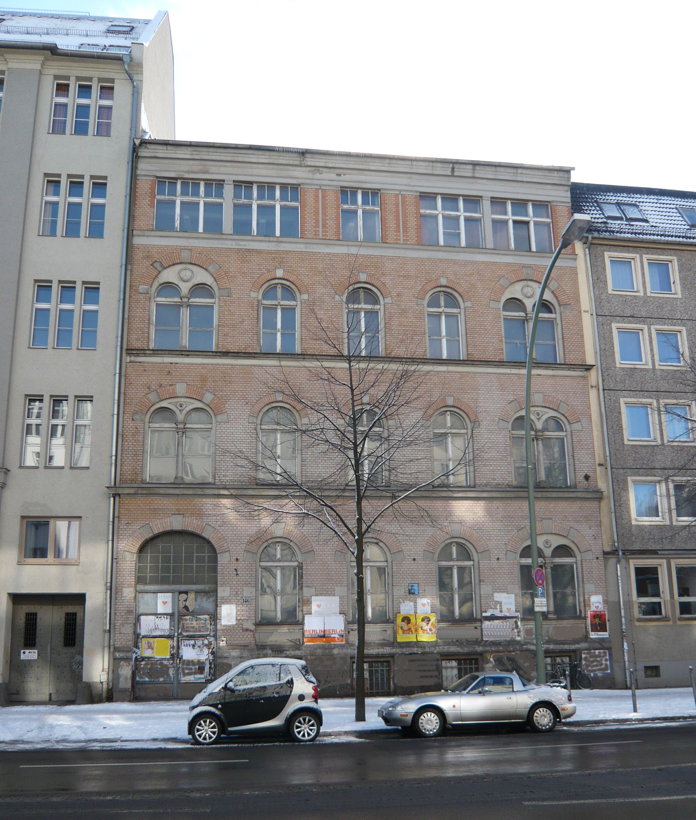 Torstraße 146 in Berlin-Mitte: früheres Israelitisches Krankenheim